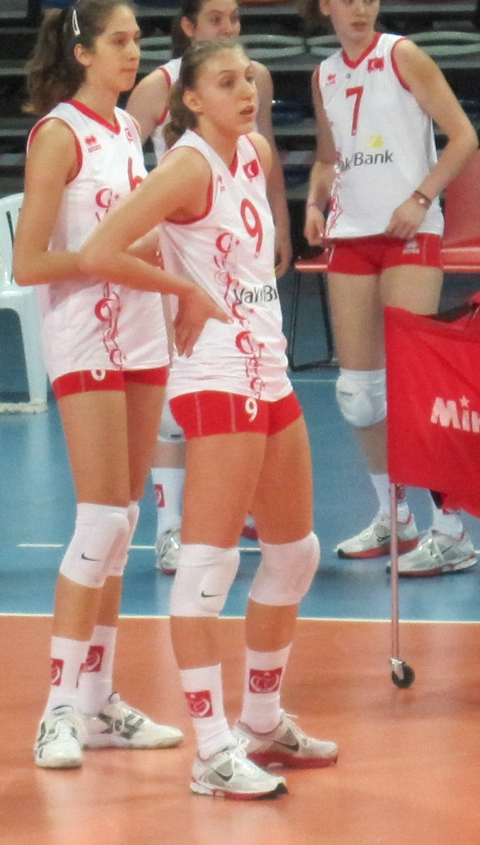 Turkish volleyball player Aslı Kalaç.